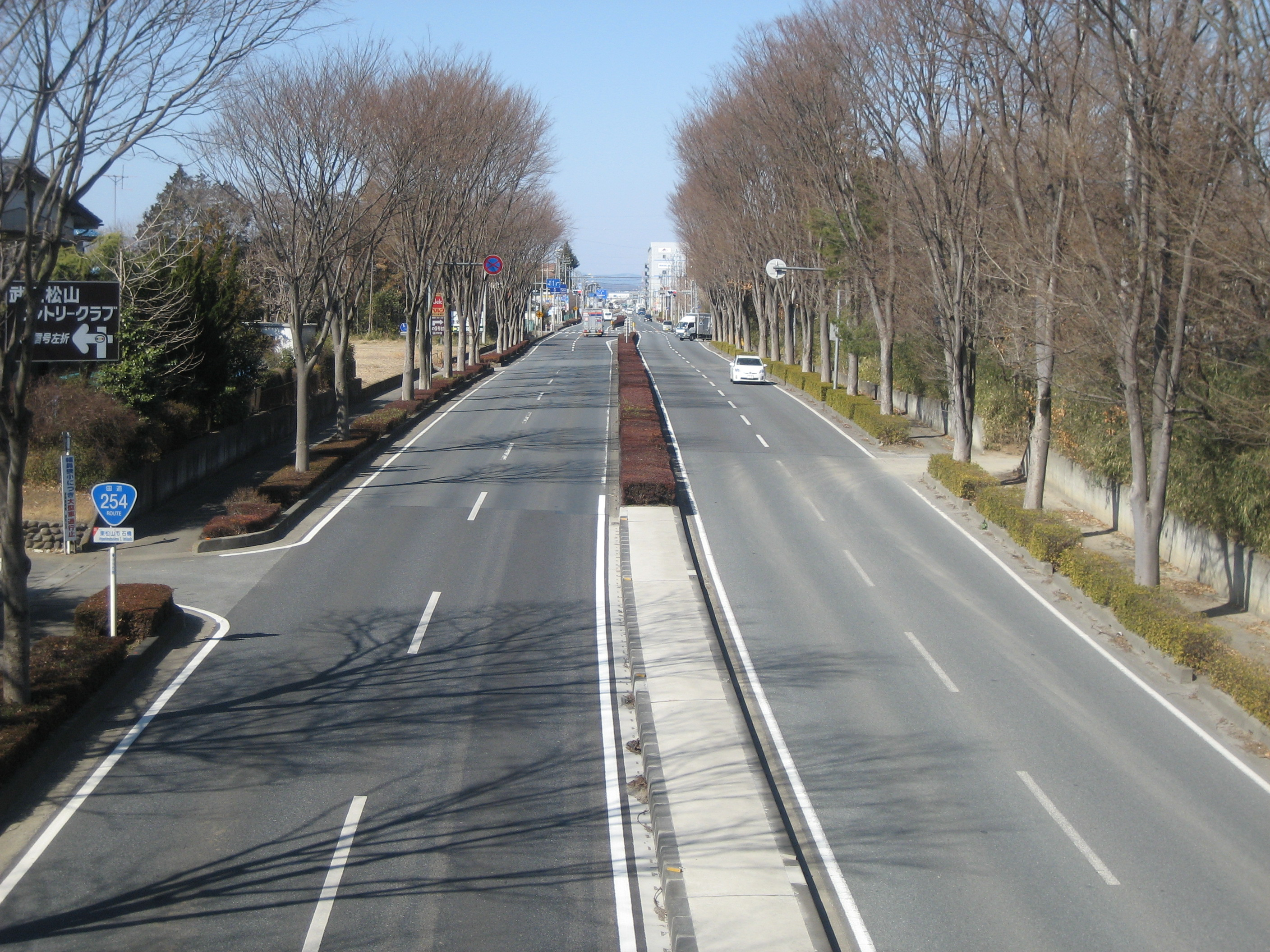 国道254号線東松山バイパス 東松山市石橋付近